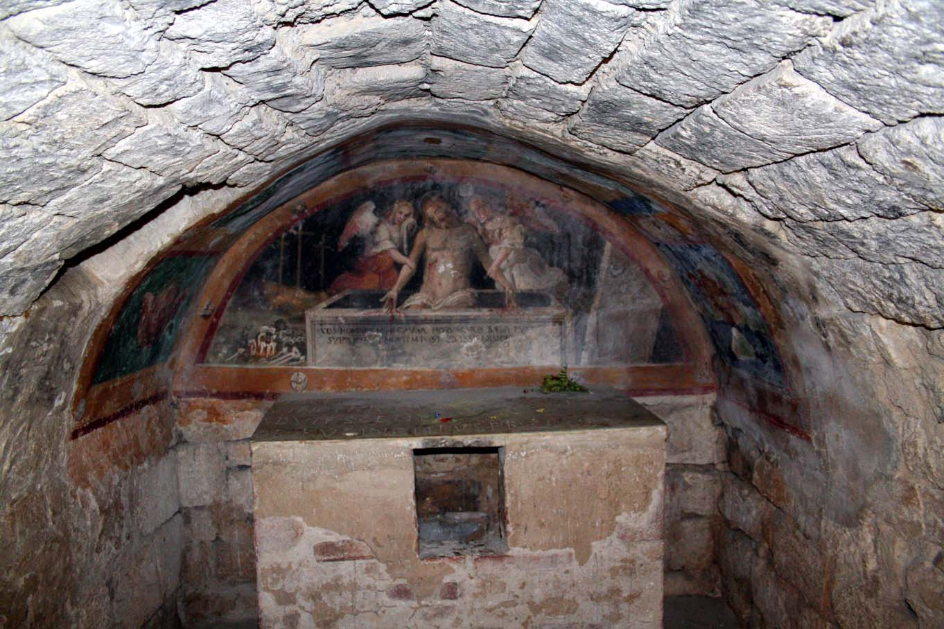 Sant Antimo: Krypta